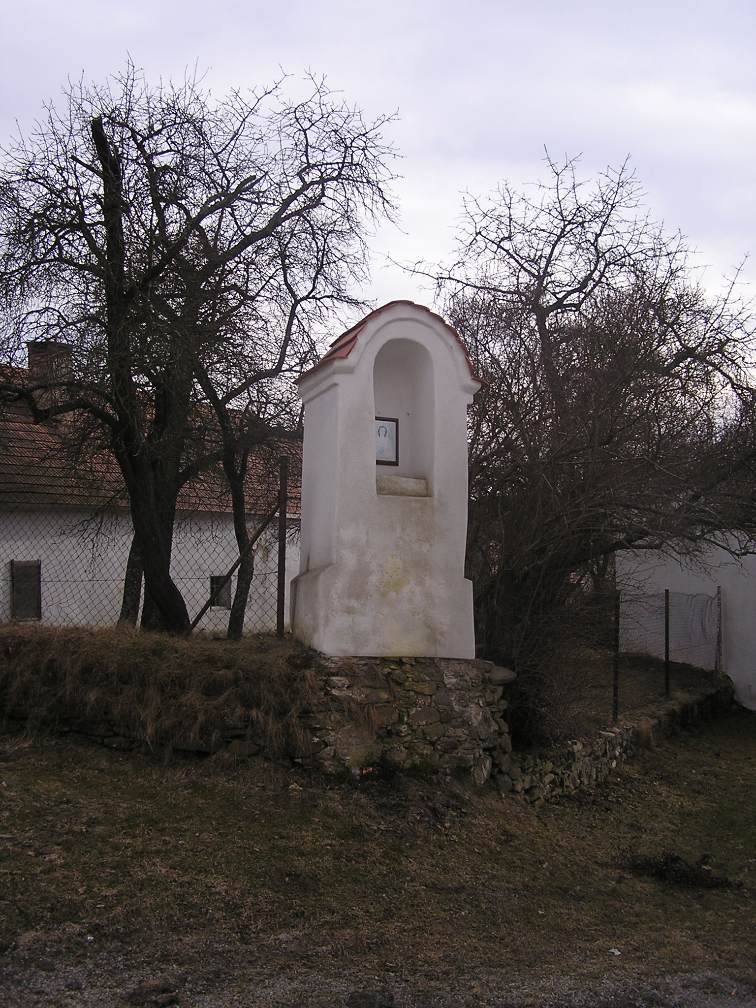 Kaple u silnice